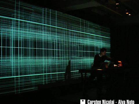 Alva Noto @ la bâtie festival 2004, Geneva